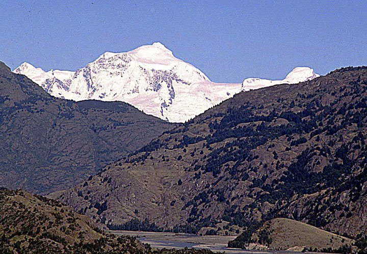 Cerro Arenales desde Rio Baker